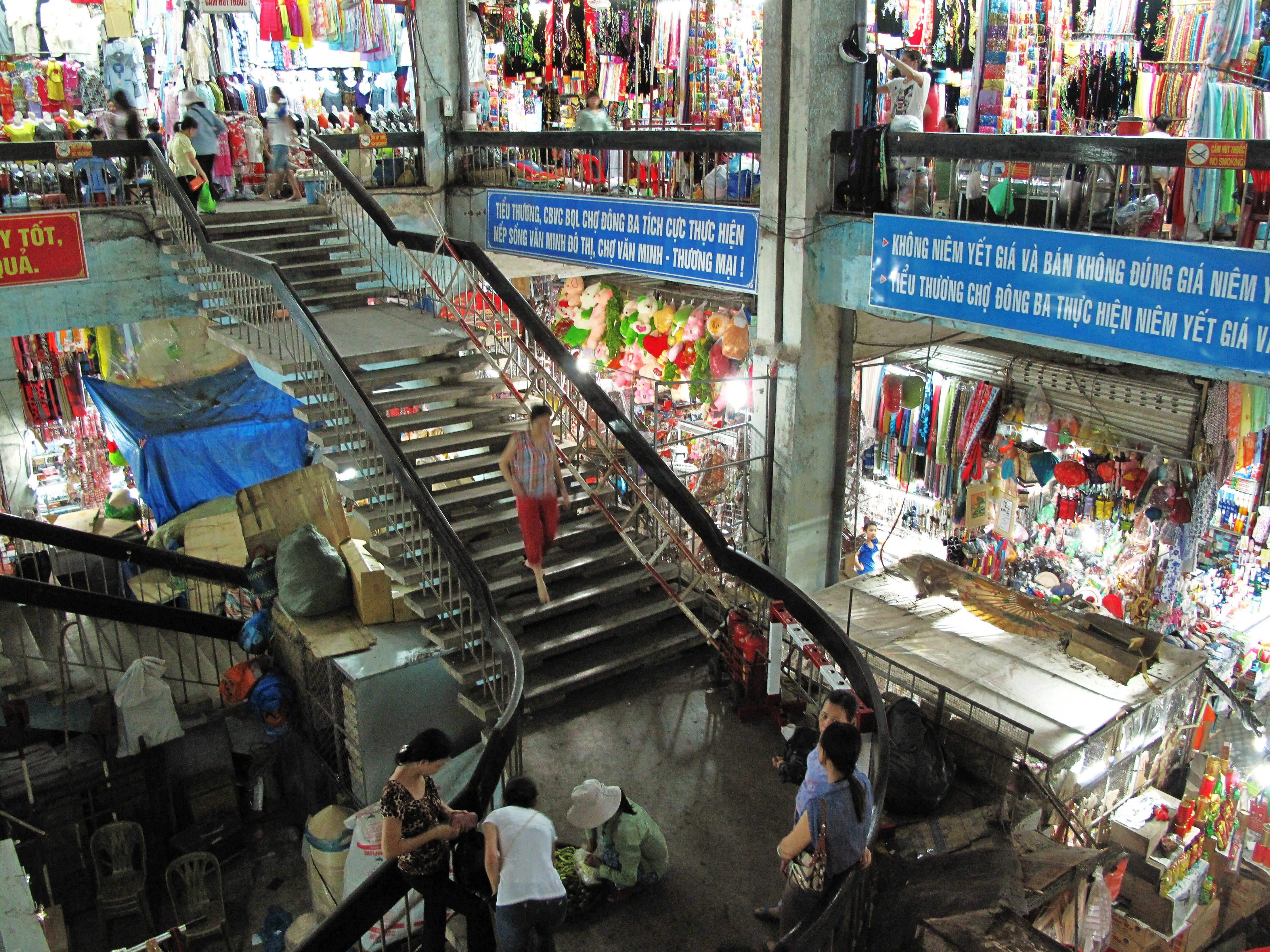 Inside Dong Ba market